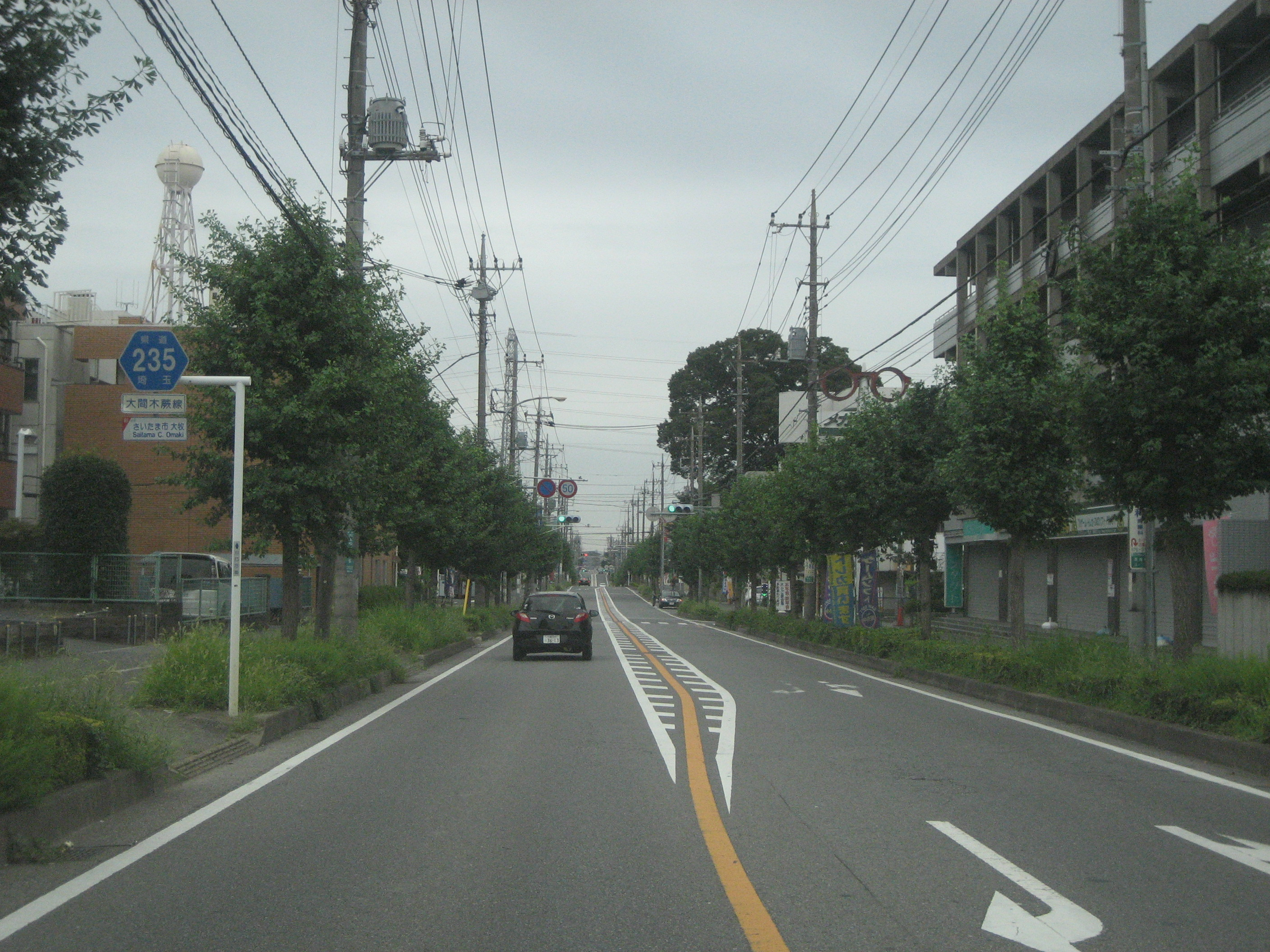 埼玉県道235号線緑区内